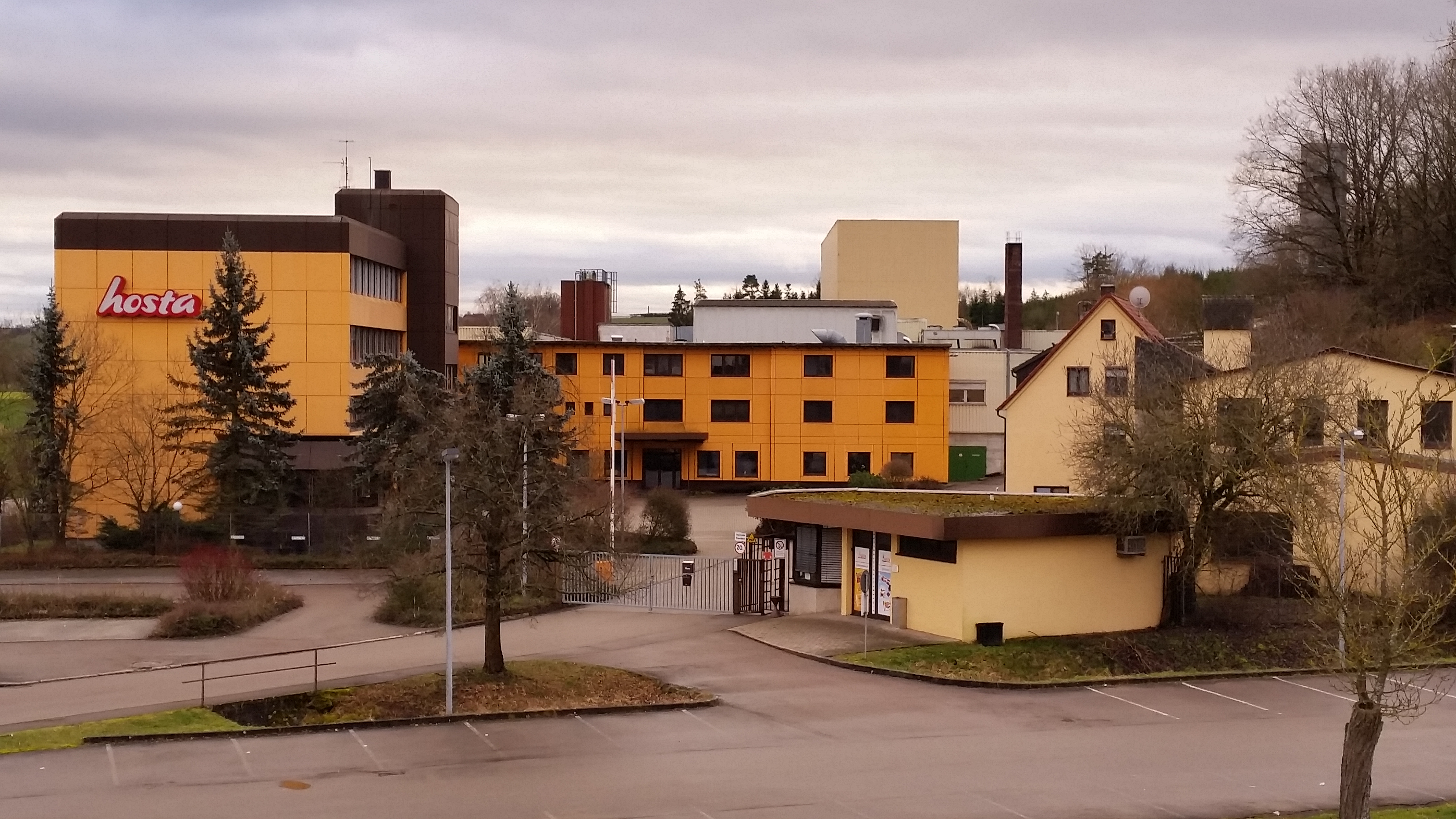 Hosta-Werke